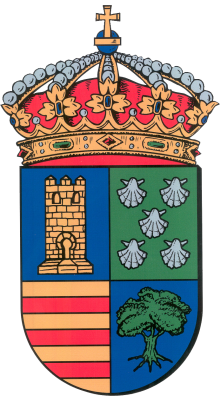 Escudo del marquesado de Tábara, en Zamora (España)